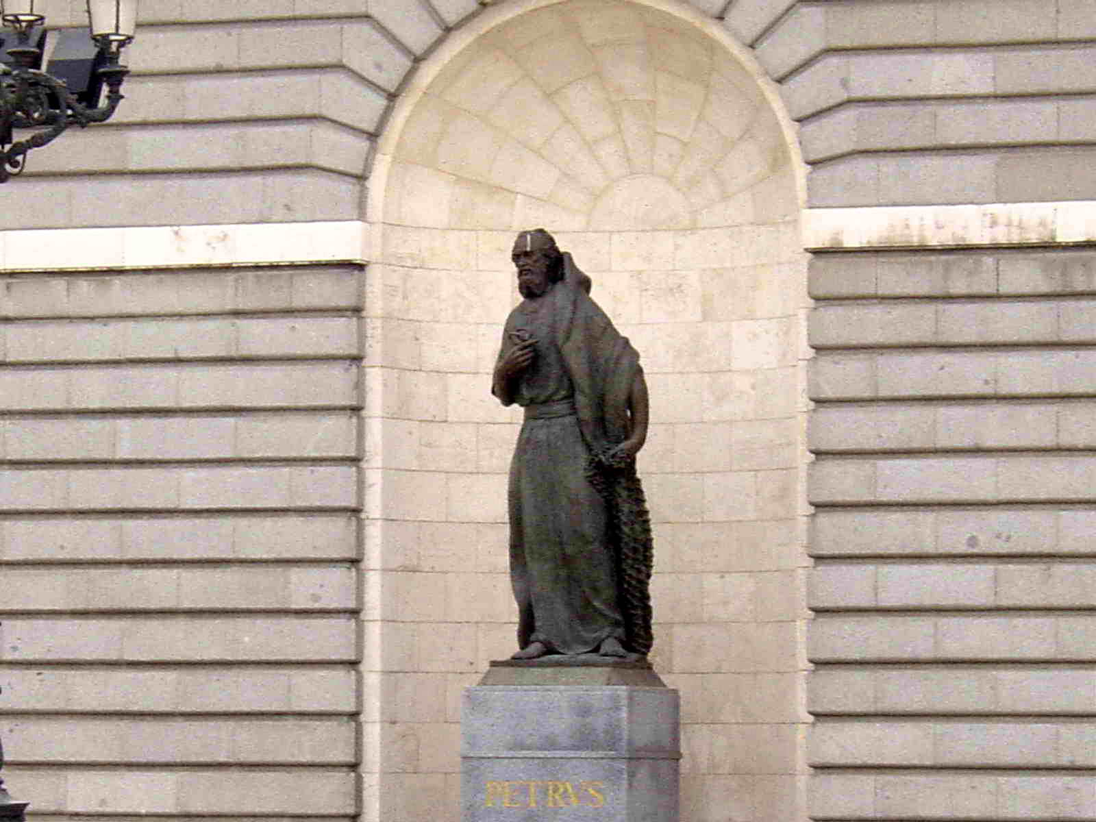 Madrid - Spain